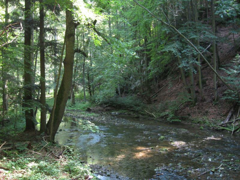 Pustý žleb - Punkva